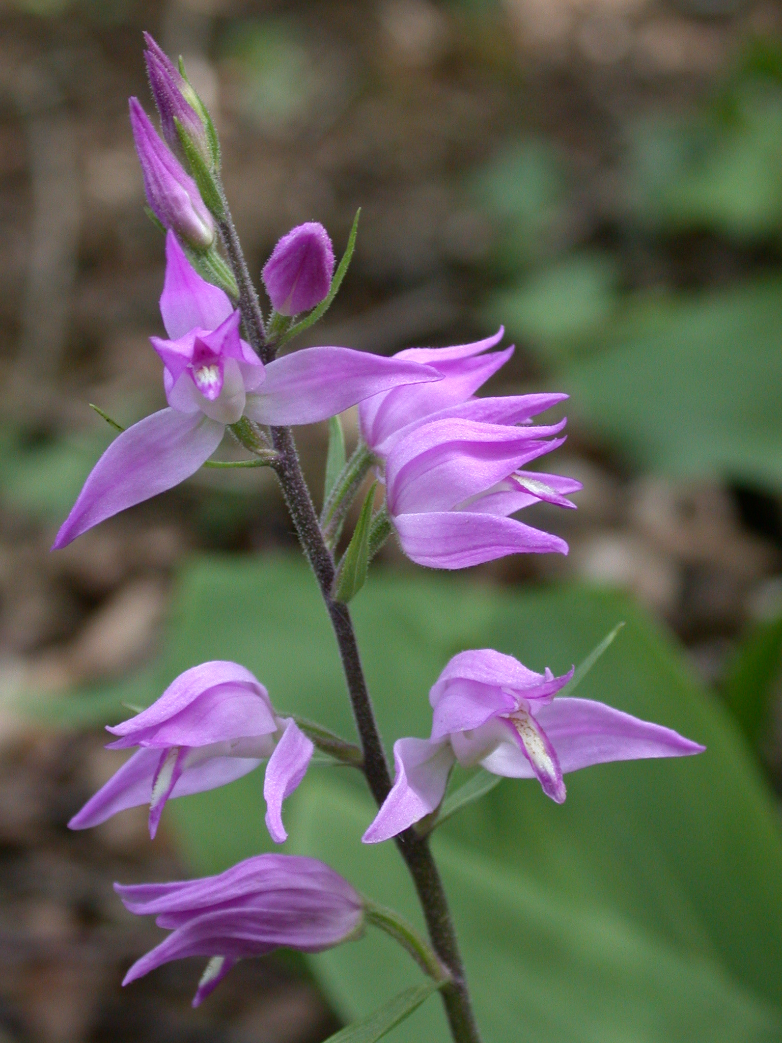 Cephalanthera rubra en Meuse (caténa de Rangeval).